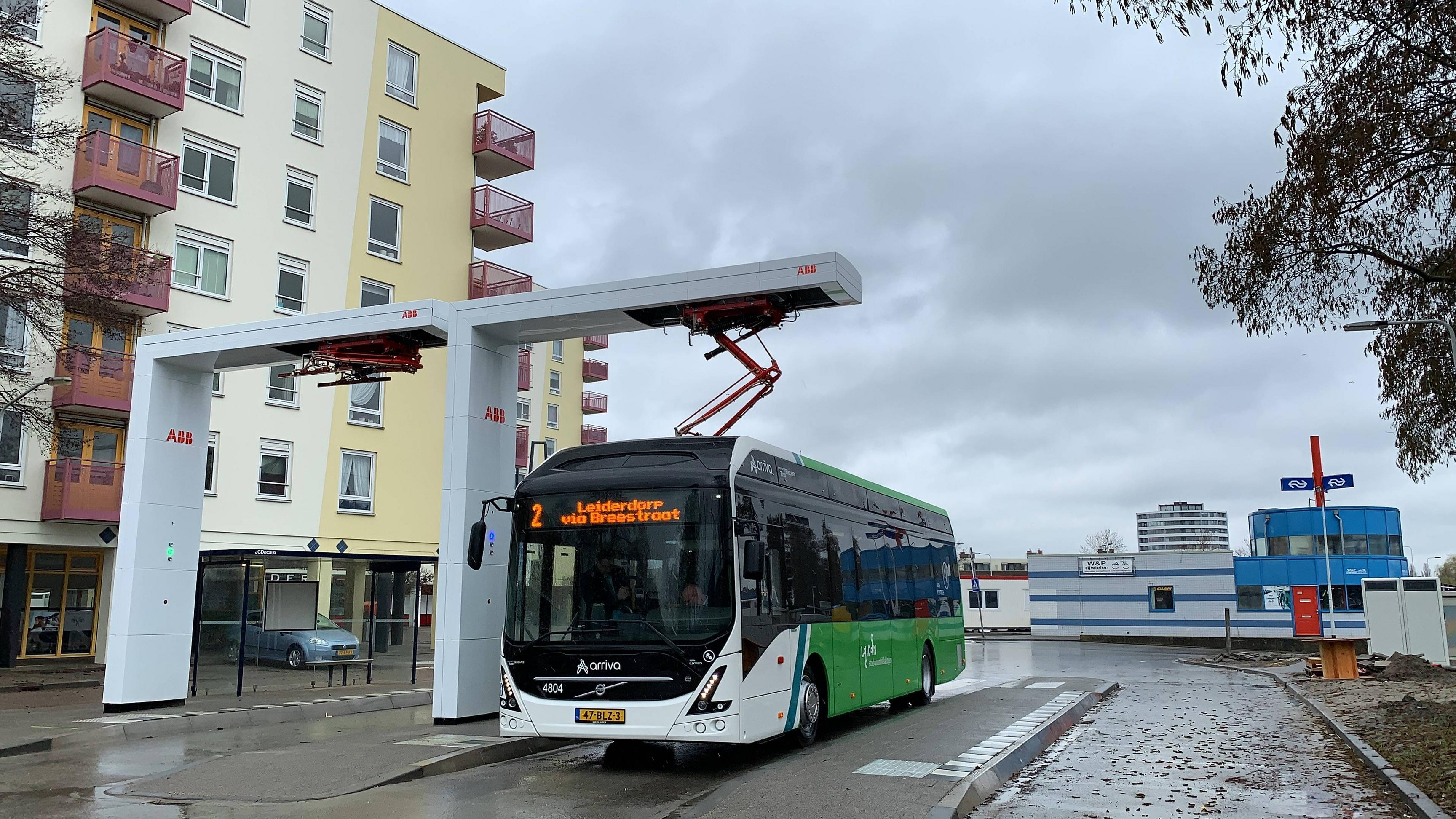 Arriva 4804 staat te laden op het busstation naast het treinstation De Vink, 3 maart 2019.